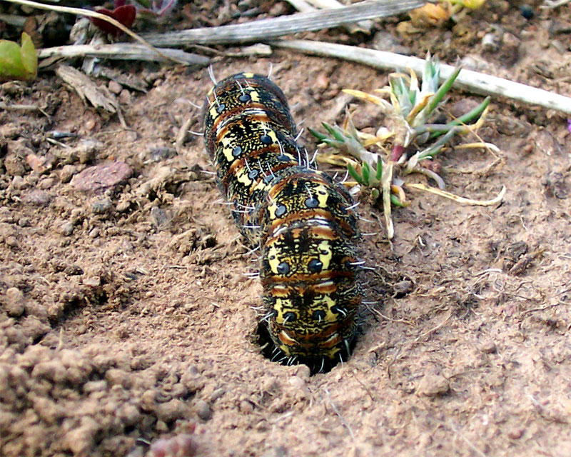 Apina callisto Angas, 1847